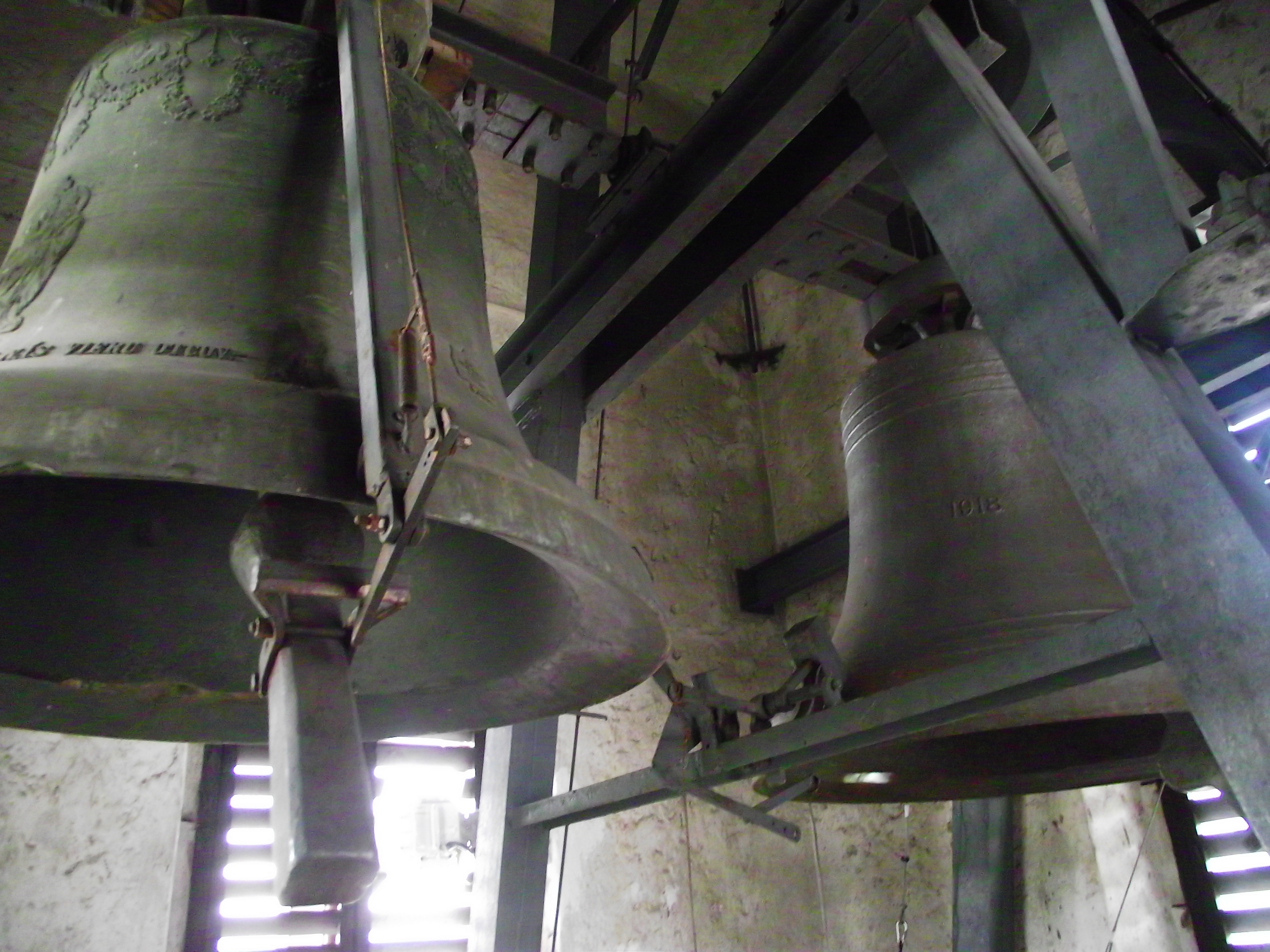 Kostolné zvony (Church`s bells)